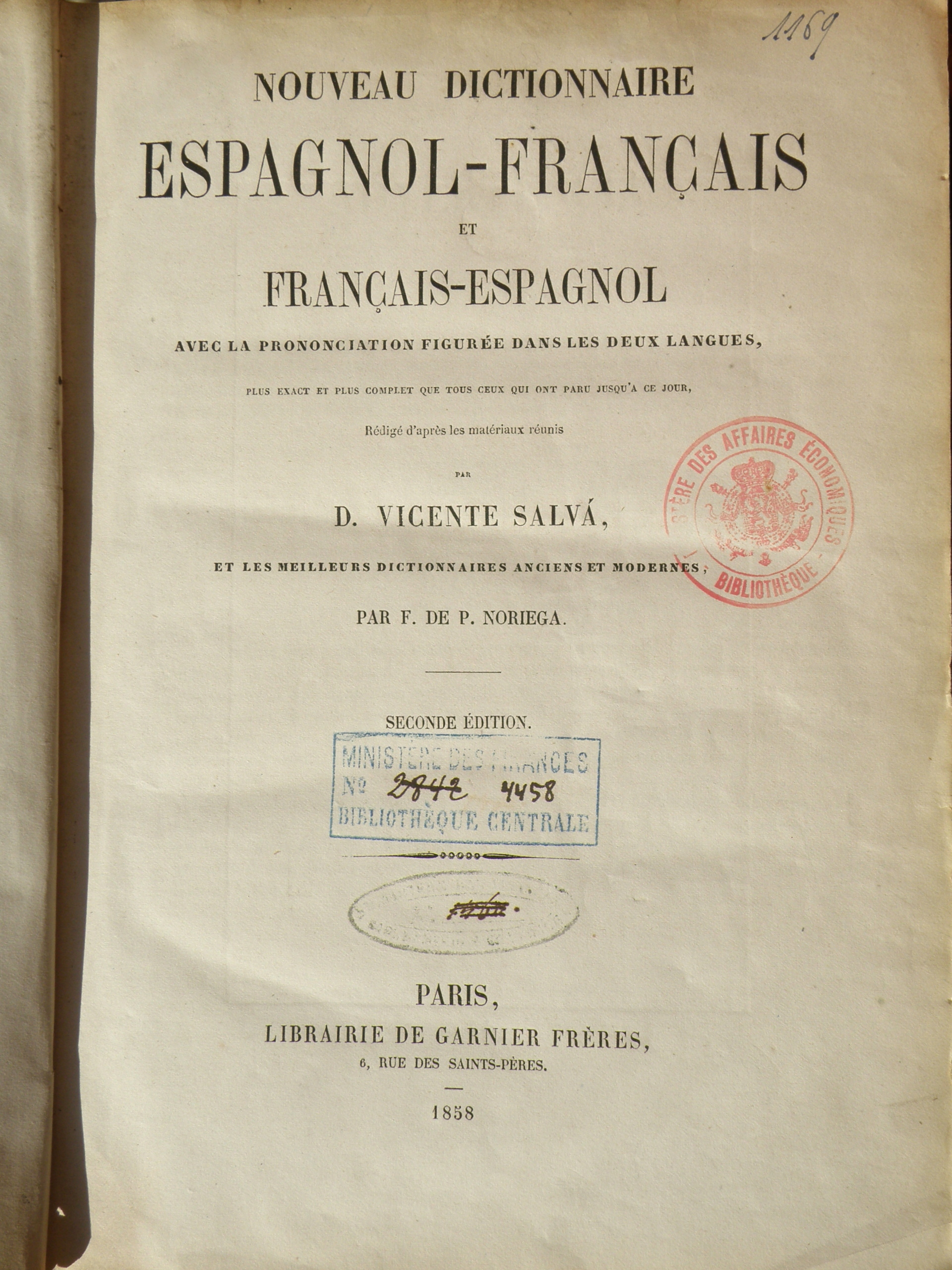 Page de titre du dictionnaire français-espagnol de Vicente Salvá, 1858.